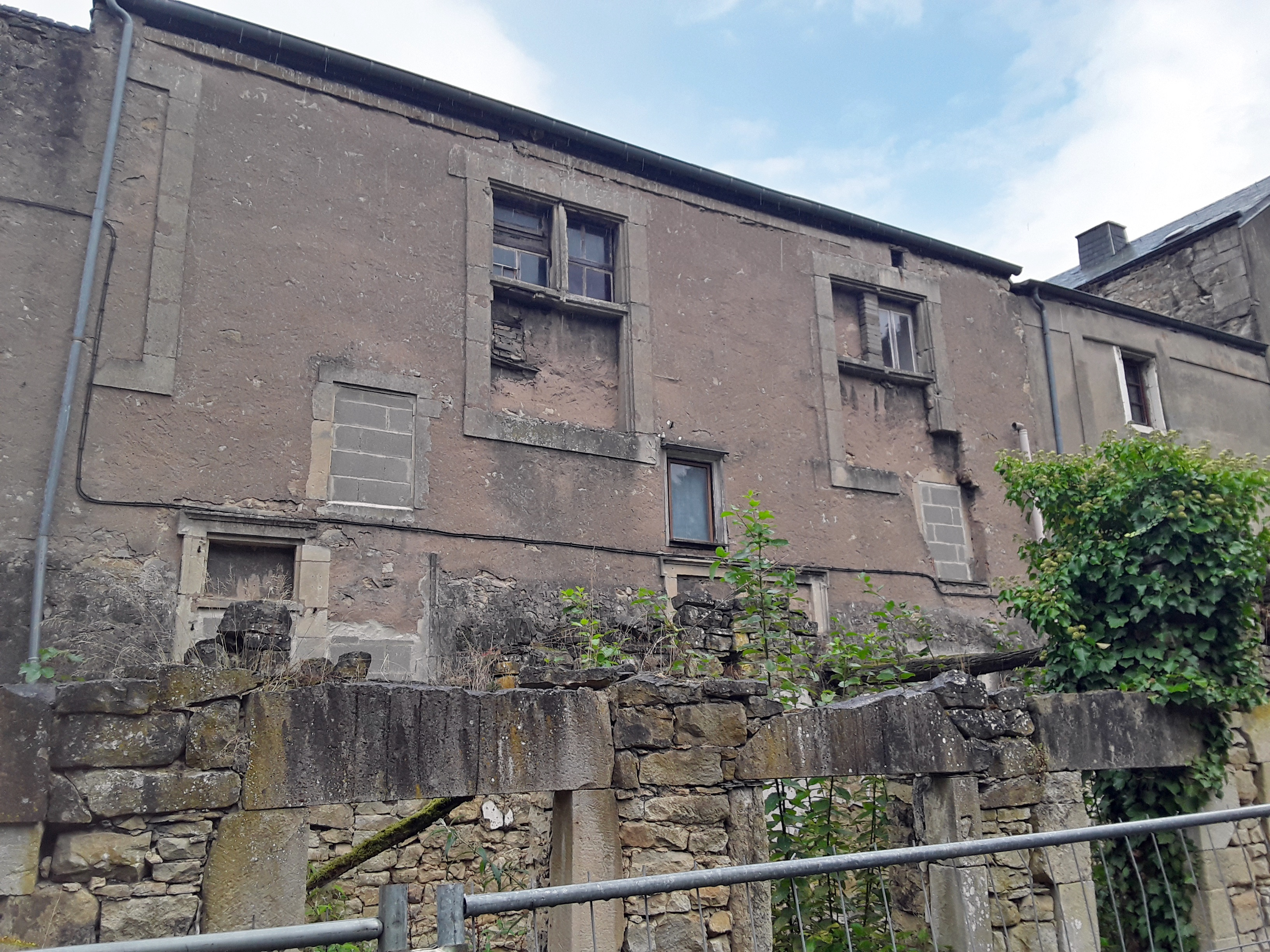 Site de l'ancien château "La Fontaine" de Pierre Ernest de Mansfeld à Luxembourg-Clausen. Fenêtres à meneaux dans les restes d'une façade de l'ancien château.